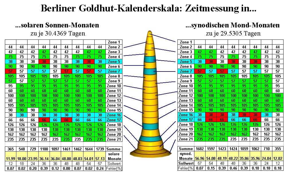 Abbildung zur Demonstration der Kalenderfunktionen am Berliner Goldhut